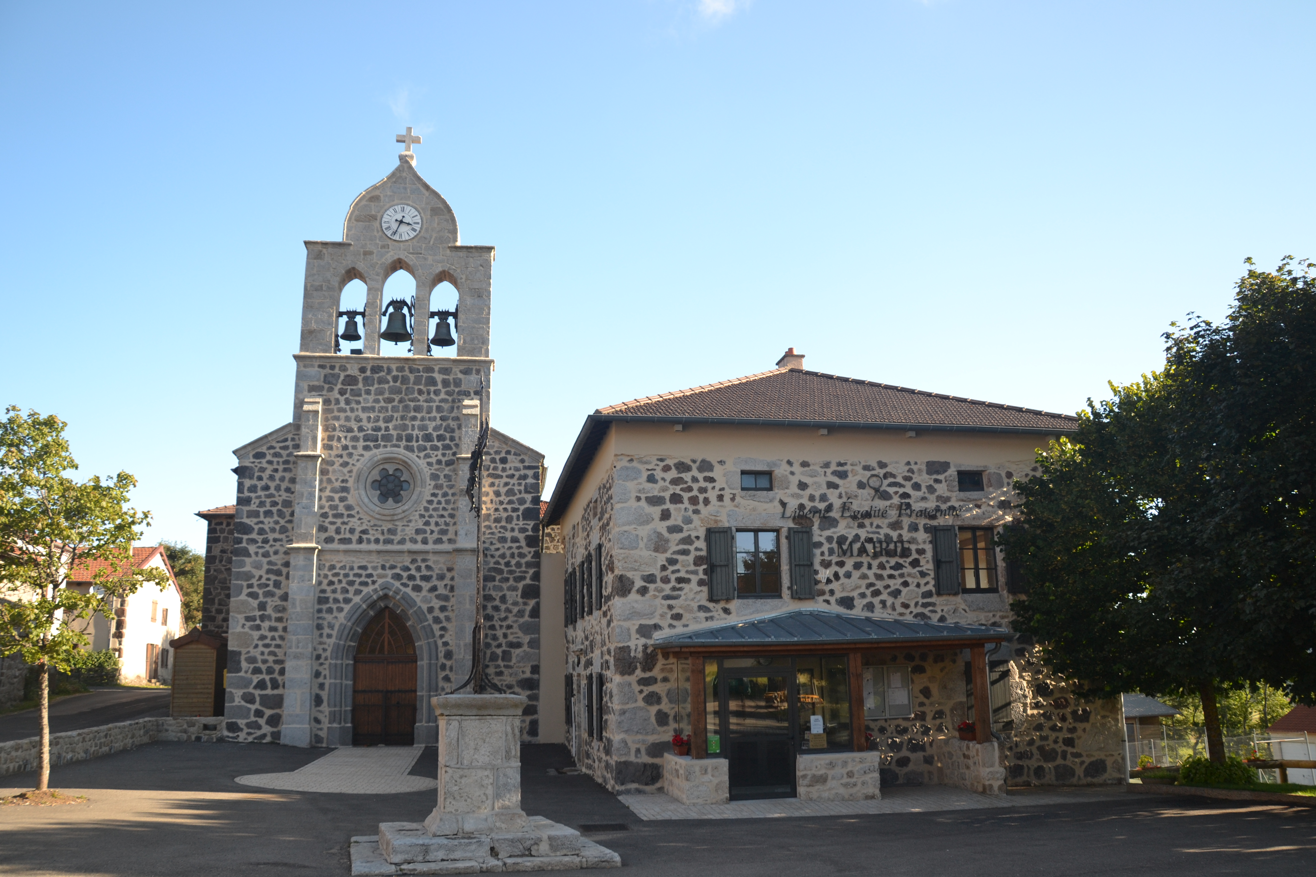 église et mairie d'Issanlas